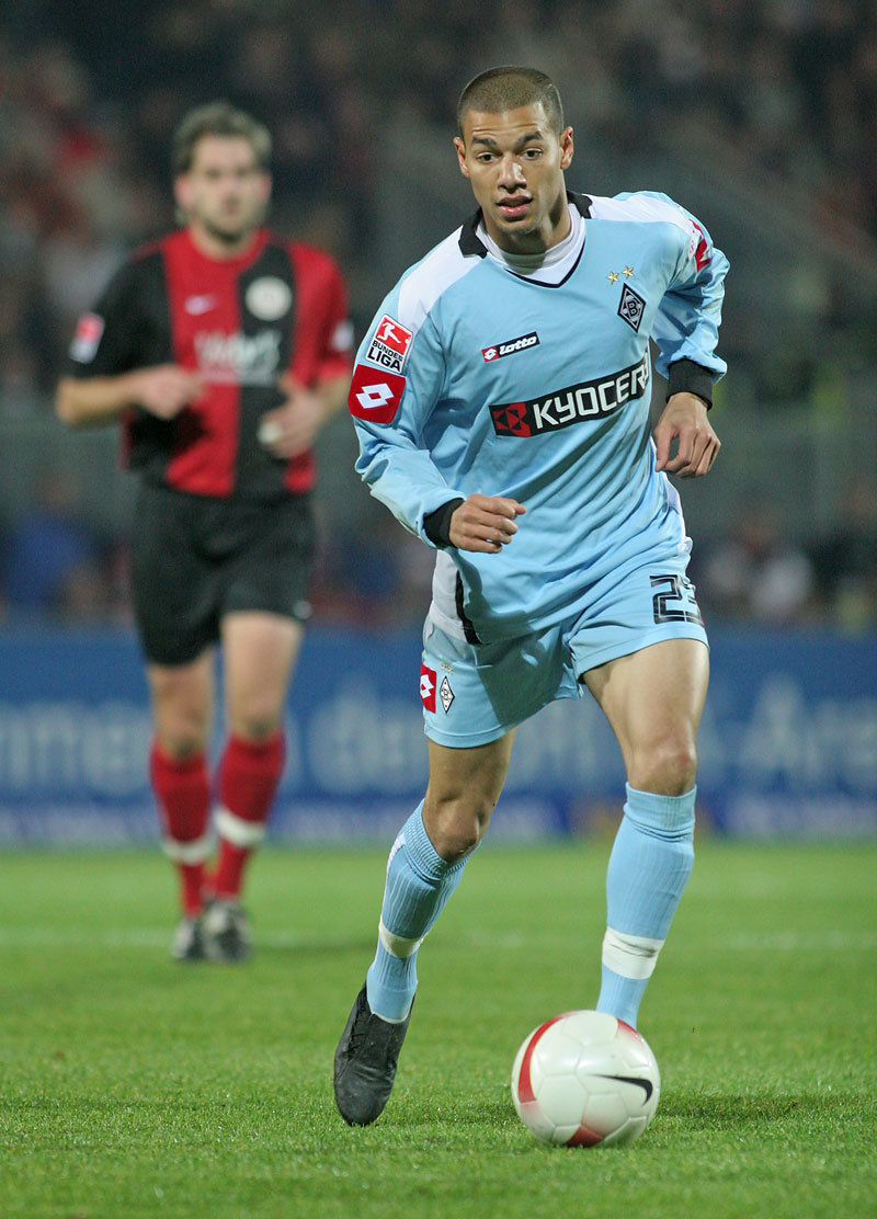 Marcel Ndjeng setzt zum Angriff an